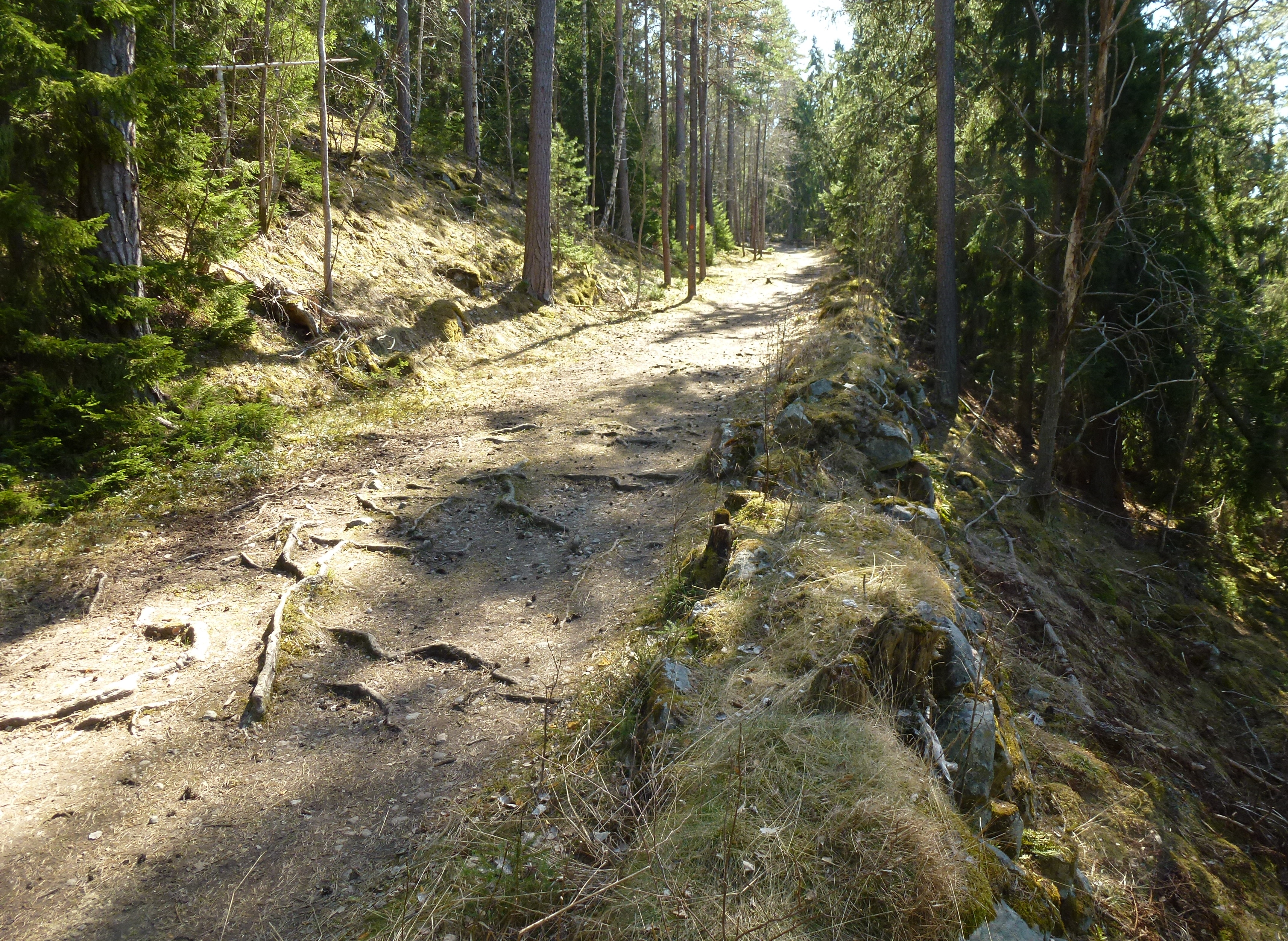 Dalkarlsbacken, vy mot syd